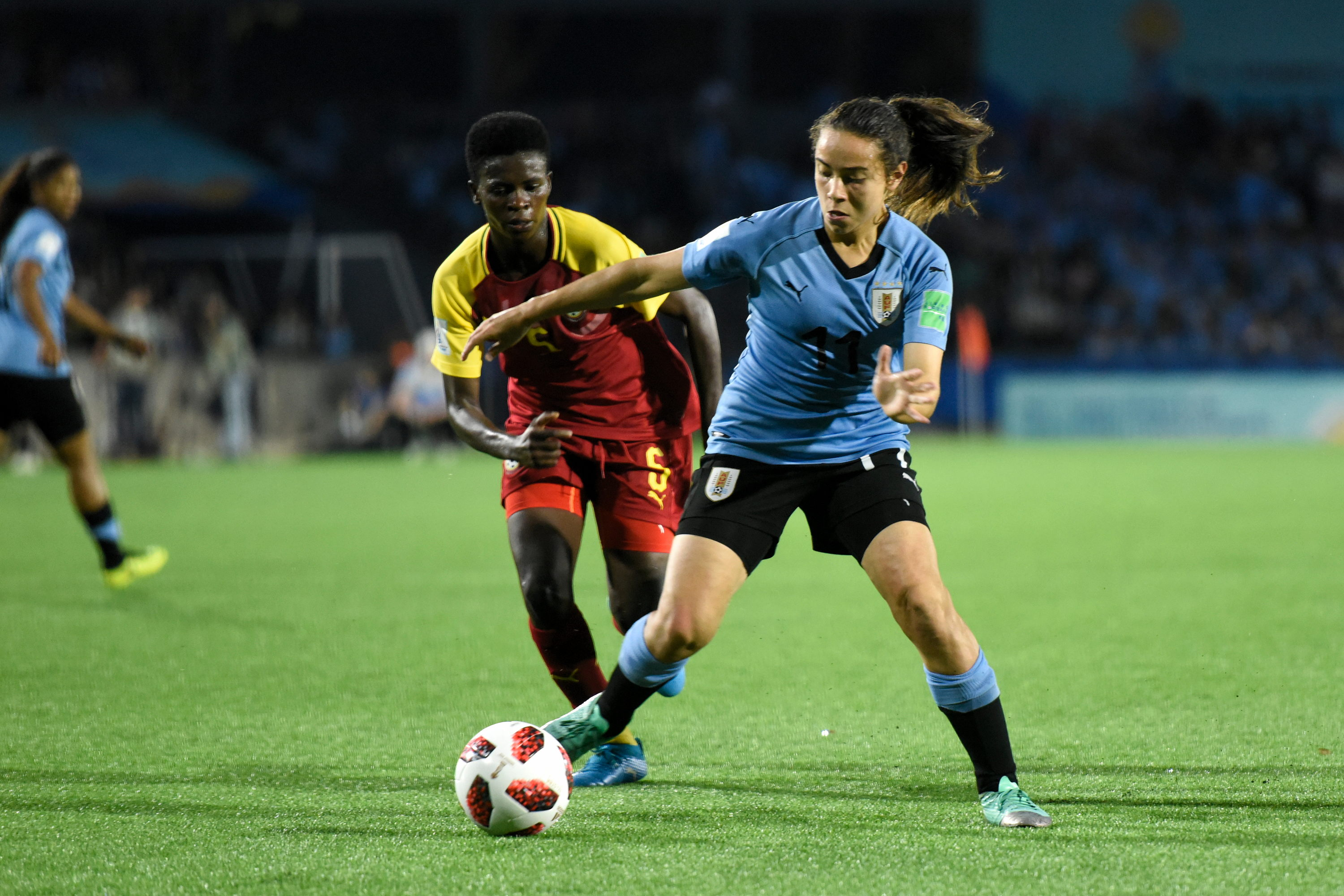 Partido inaugural del Mundial Sub17 Femenino 2018, Uruguay-Ghana